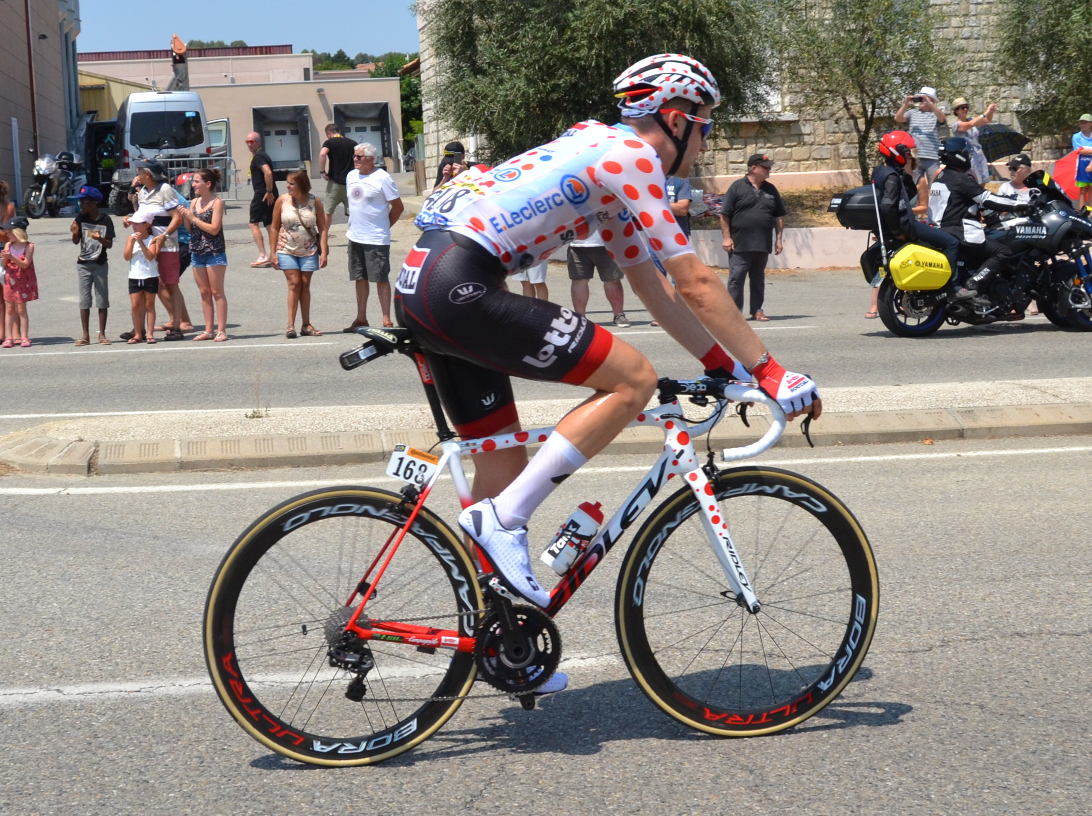 Peloton lors de l'étape 17 du Tour de France 2019, à Rasteau